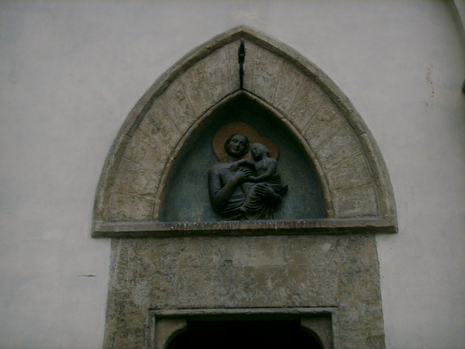 Loggia_del_bigallo,_madonna_con_bambino,_Alberto Arnoldi.JP